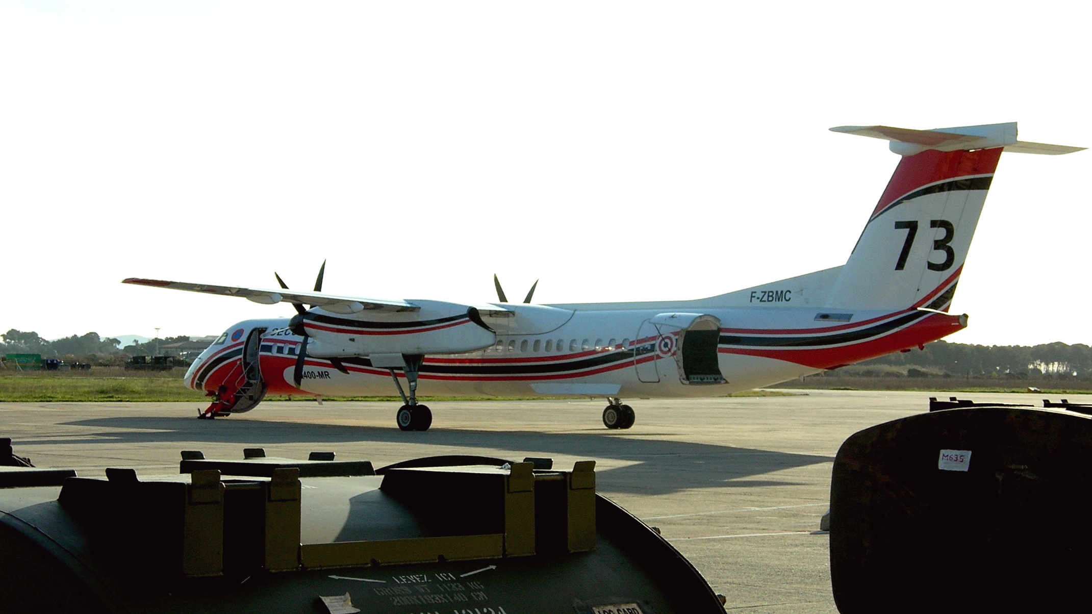 Dash-8 de la Sécurité Civile française sur la Base d'Aéronautique Navale de Hyères-Le Palyvestre, le 10 mars 2009.